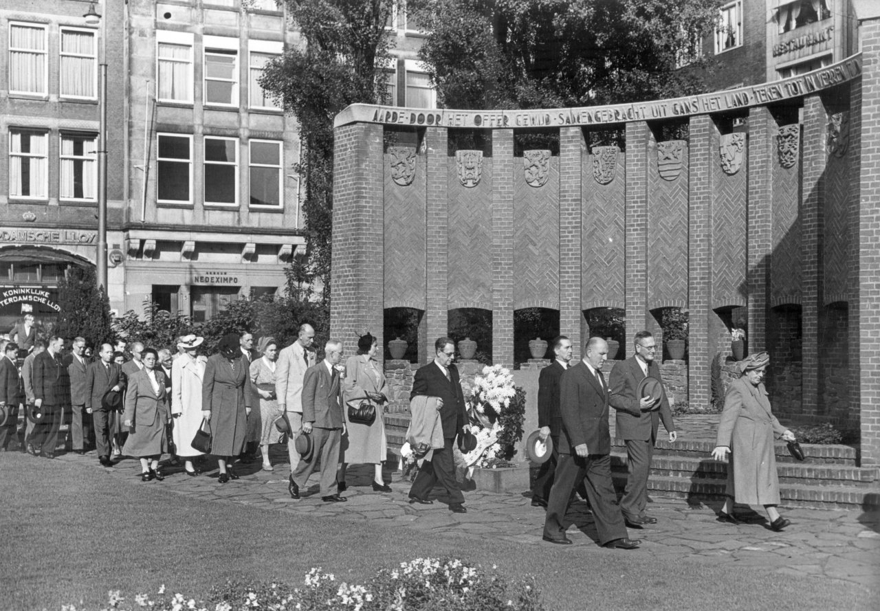 Kranslegging door de Nederlandse Bond van ex-geinterneerden in Indonesie bij het Nationaal Monument op de Dam. Dit monument (op deze foto), ontworpen door A.J. van der Steur (1895-1963) en Auke Komter, werd onthuld in 1947 en maakte in 1956 plaats voor het huidige monument ontworpen door architect J.J.P. Oud. Tekst bovenaan het monument: Aarde, door het offer gewijd, samengebracht uit gans het land, teken tot in verren tijd van heugenis en vasten band. Collectie: Nationaal Archief / Fotocollectie Elsevier Fotograaf: Onbekende Anefo fotograaf Datum: 08-09-1951 Bestanddeelnummer 047-0588